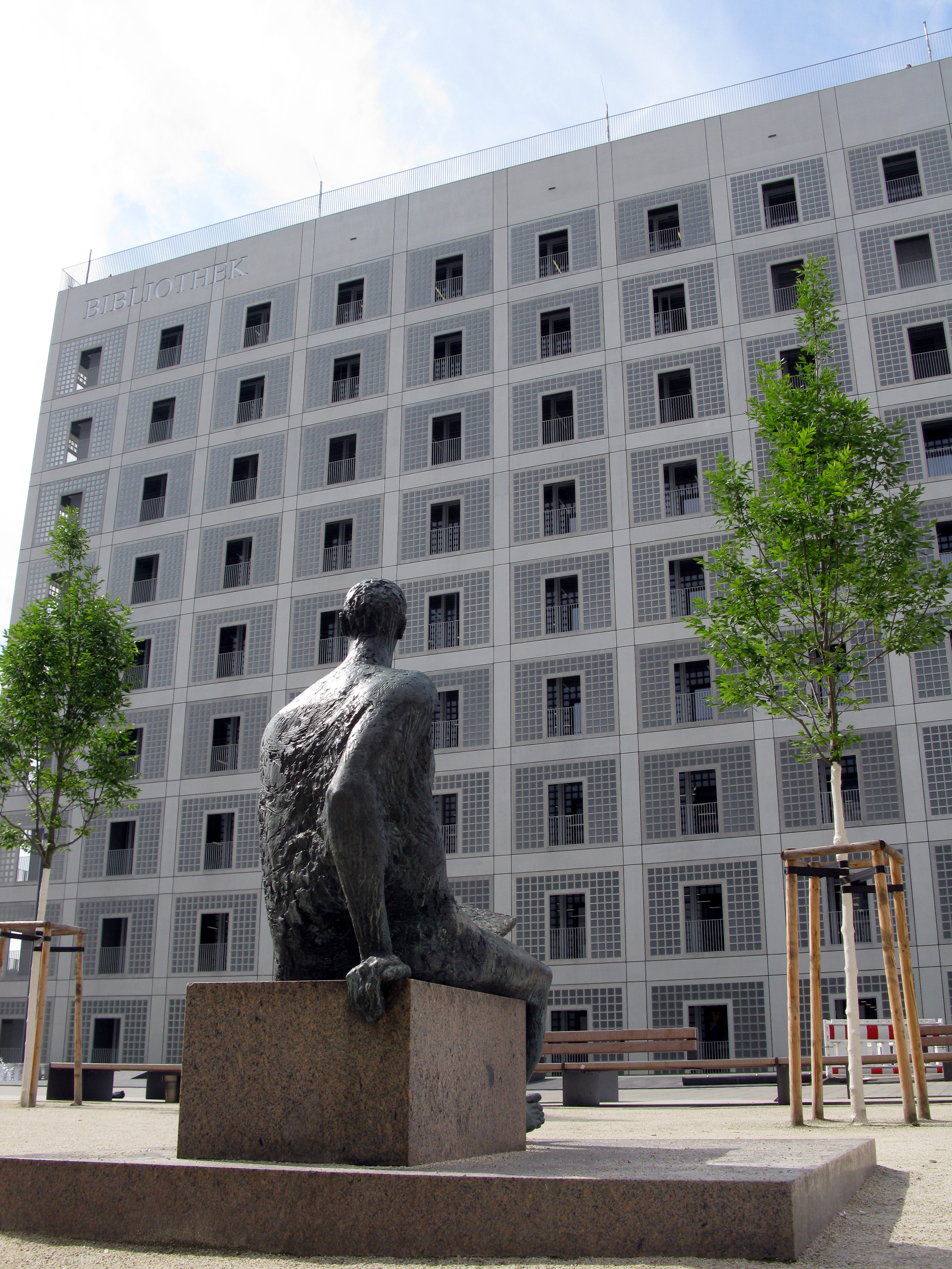 Sitzender lesend, 1965 von Fritz Nuss am Mailänder Platz in Stuttgart mit Stadtbibliothek